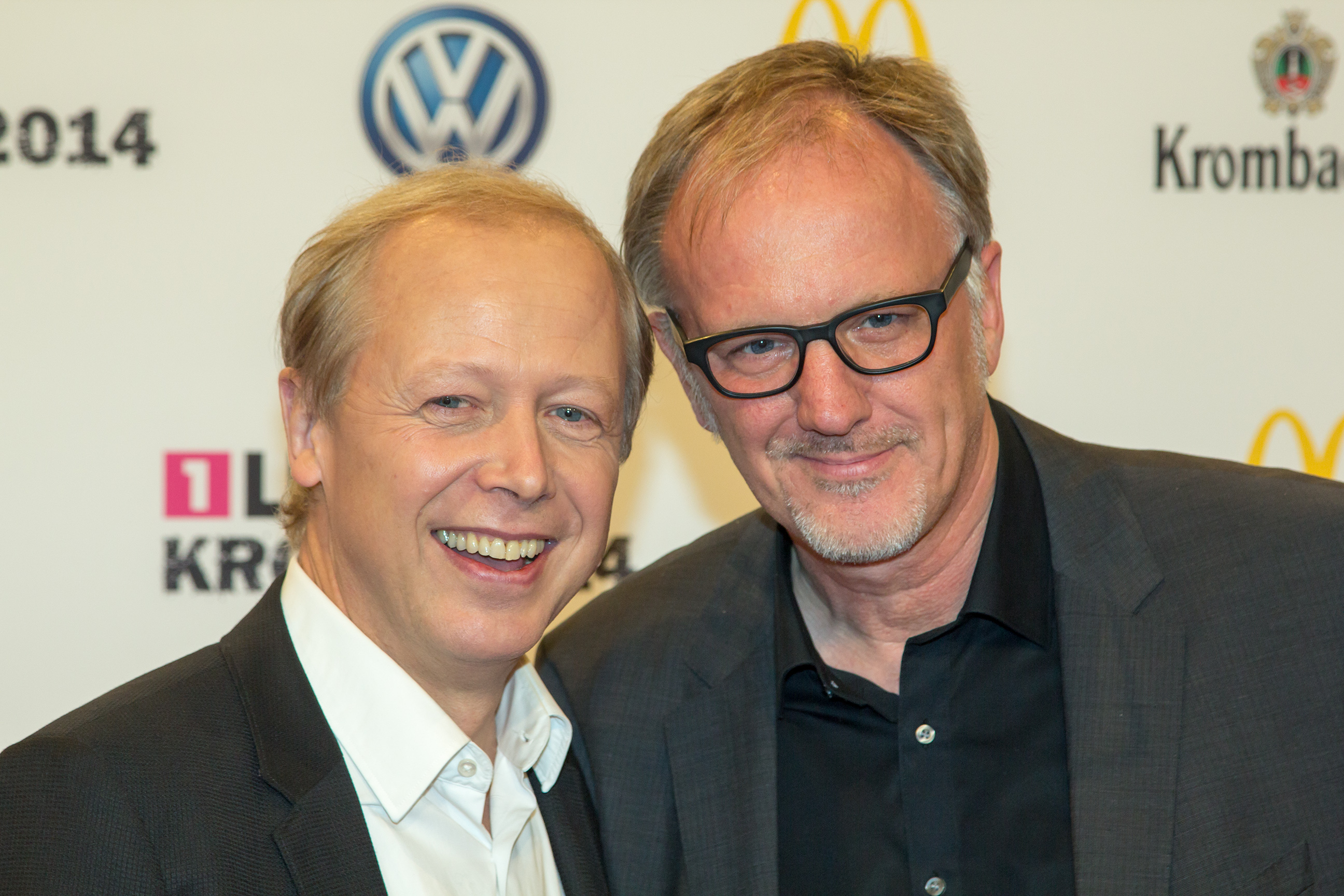 1LIVE Krone 2014 in der Bochumer Jahrhunderthalle: Tom Buhrow mit Jochen Rausch auf dem roten Teppich